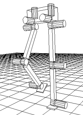 A drawing of biped walking robot model.